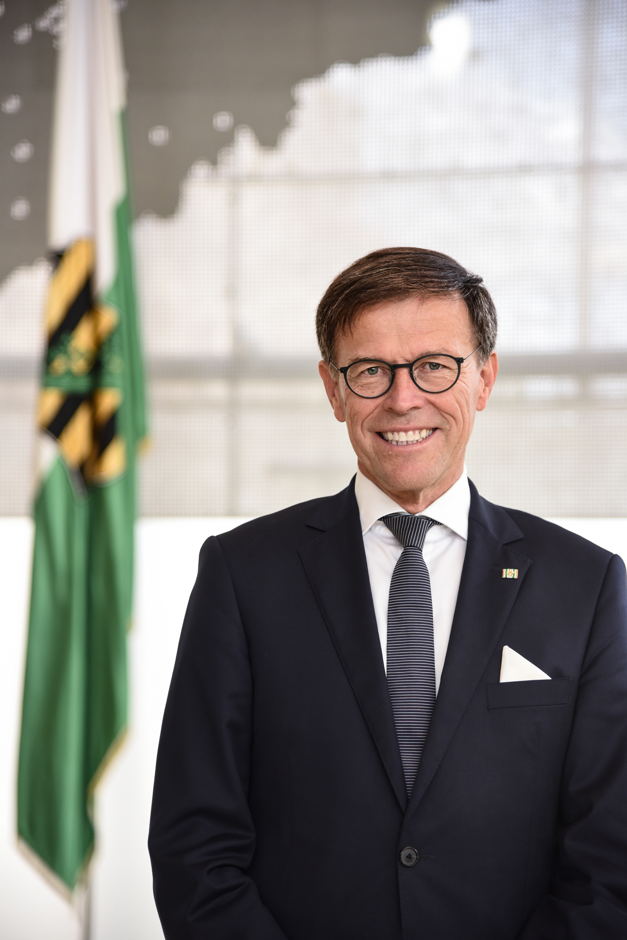 Dr. Matthias Rößler, Präsident des Sächsischen Landtags.